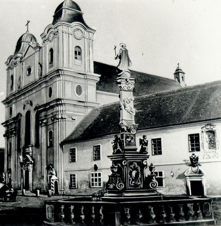 Biserica Piaristilor si Statuia Fecioarei Maria la 1859 - Piarista templom Kolozsvárott 1859-ben